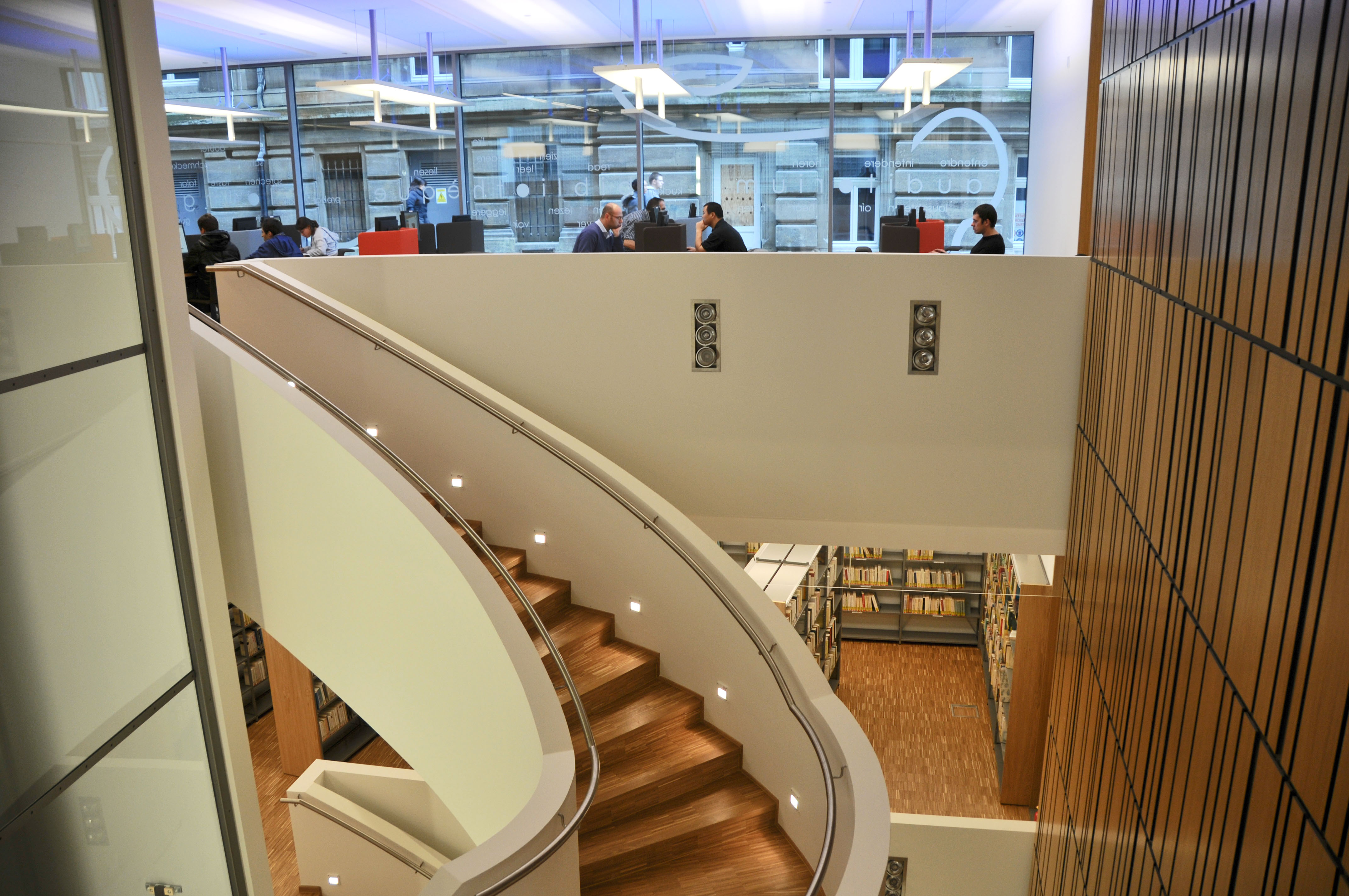 Sujet: Bibliothèik vun der Stad Lëtzebuerg, dräi Niveauën Auteur: lb : User: Cayambe Source: Eege Foto. Erlabnes vun der Directrice. Lizenz: Creative Commons